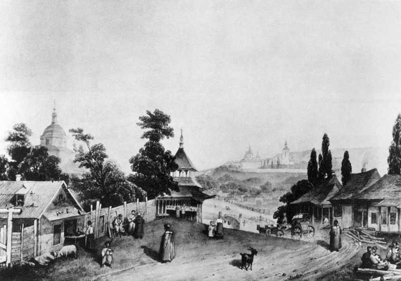 Куренівка. Кінець 1840-х pp.